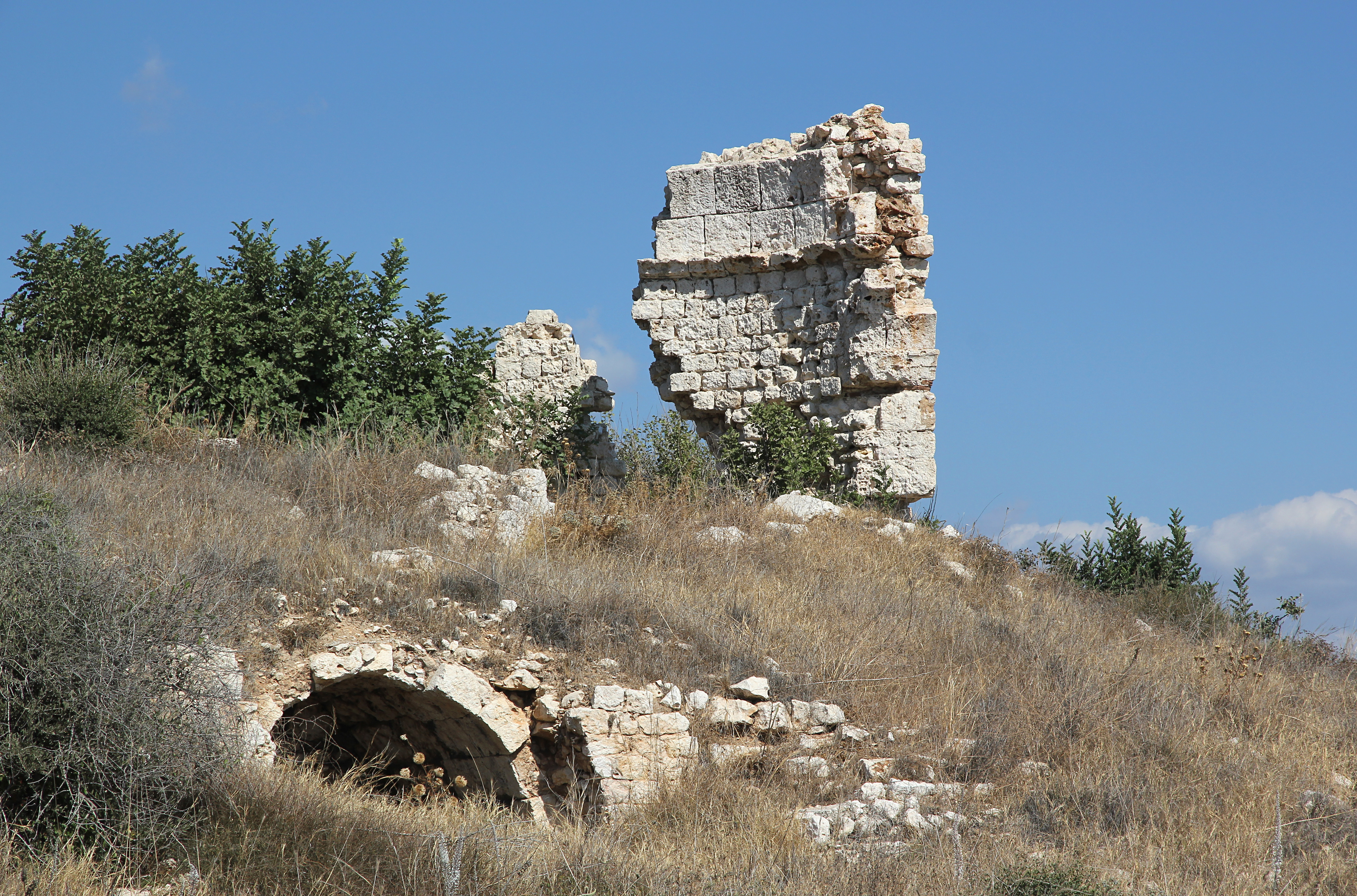 Korykos, archäologischer Fundort in der Südtürkei, Begräbniskirche, Apsis von Westen, im Vordergrund ein Hypogäum